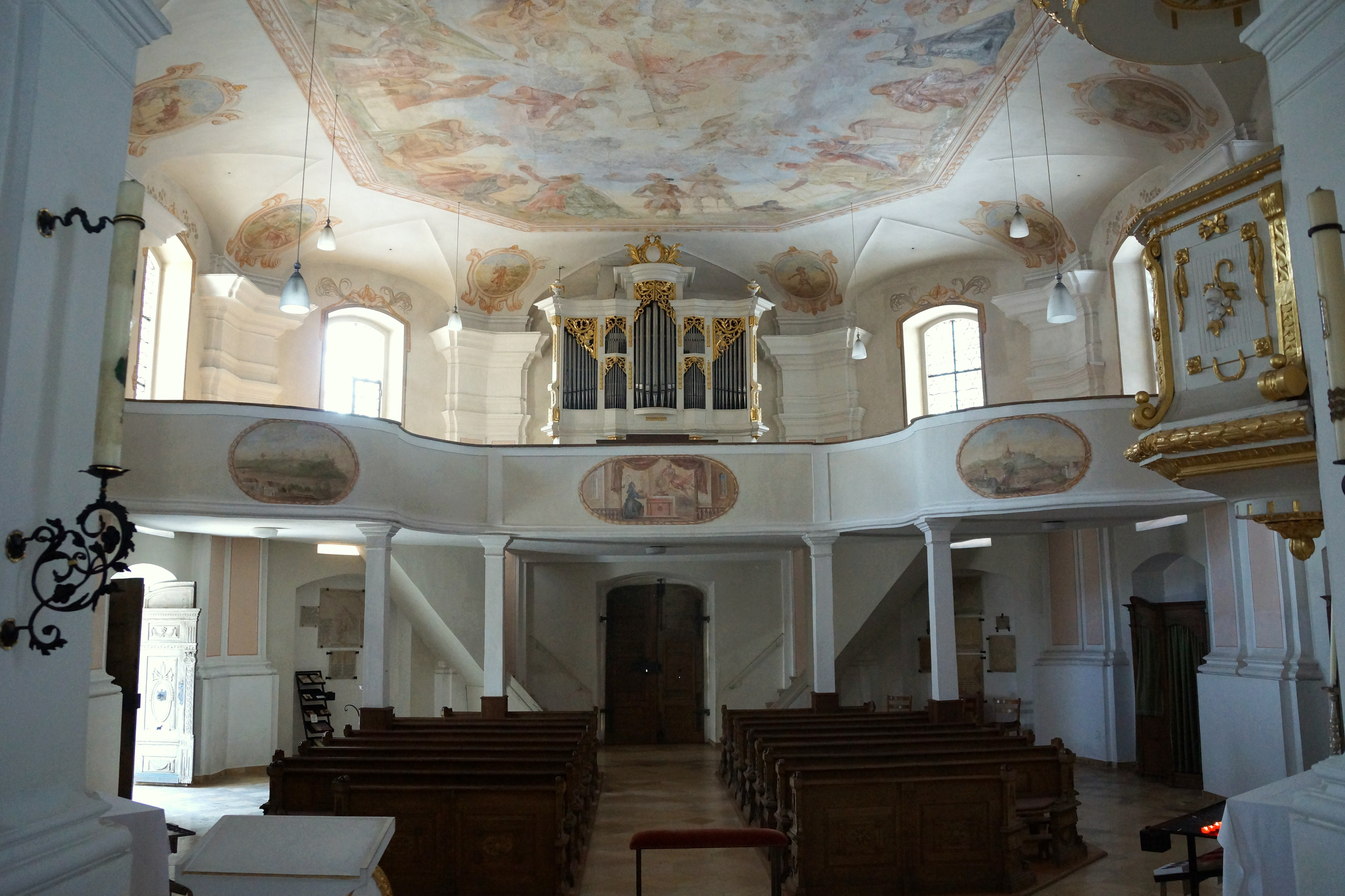 Herz-Jesu-Berg bei Velburg